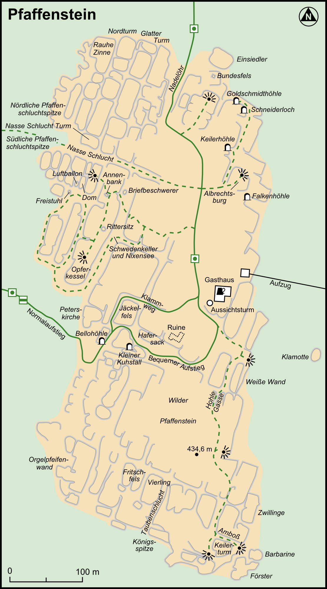 Detailkarte des Pfaffensteins in der Sächsischen Schweiz